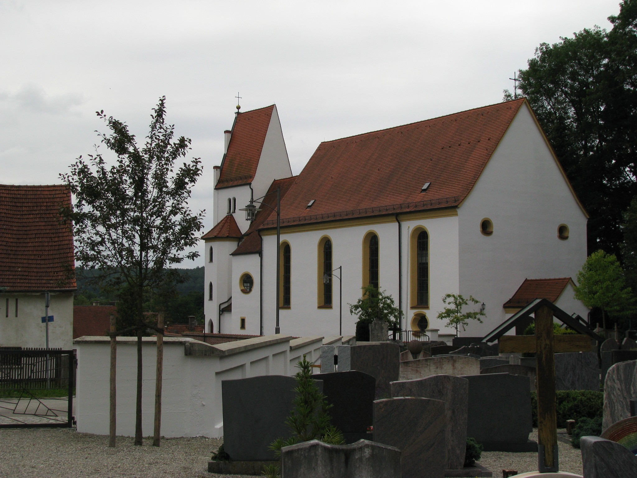 Pfarrkirche St. Stephanus Hainhofen, Nordwestansicht